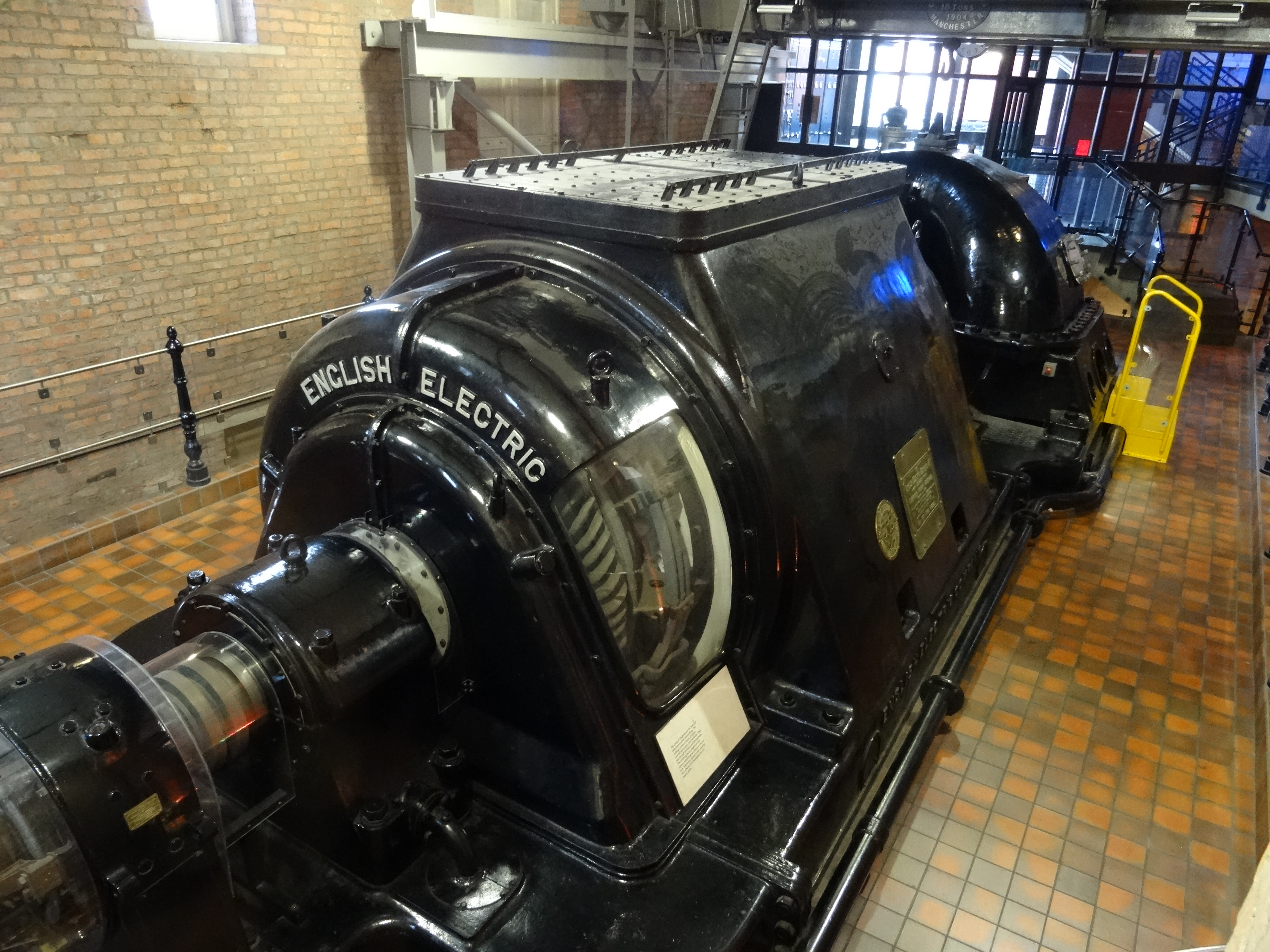 Vue du musée des sciences et de l'industrie à Manchester en octobre 2015.